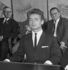 Vorstellung des neuen Generalintendanten Joachim Klaiber (2.v.r.) und Generalmusikdirektor Peter Ronnefeld (5.v.r.) vom Theater Kiel. Im Bild rechts Stadtschulrat Kurt Max Hoffmann (1.v.r.).